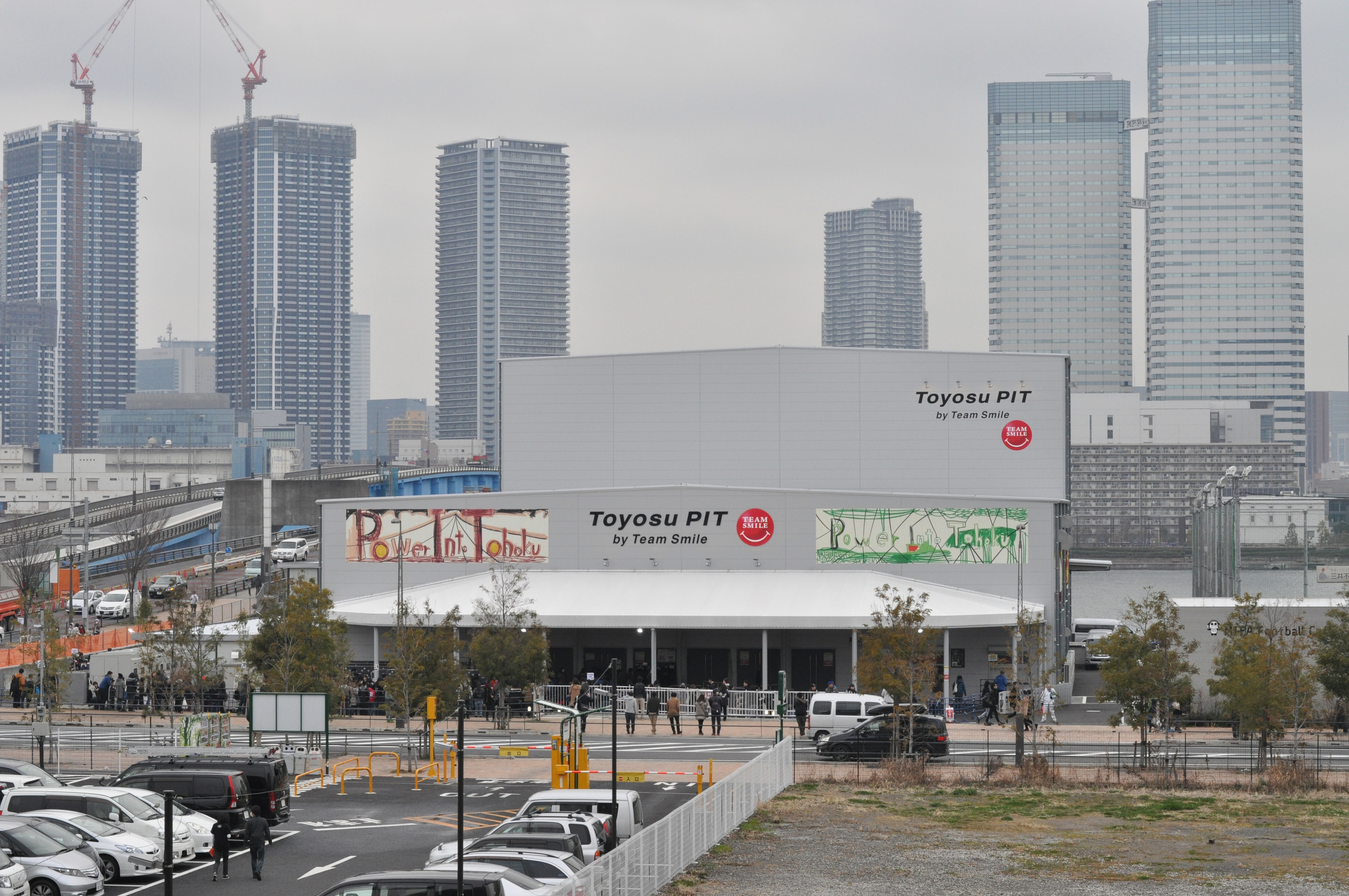 豊洲ピット